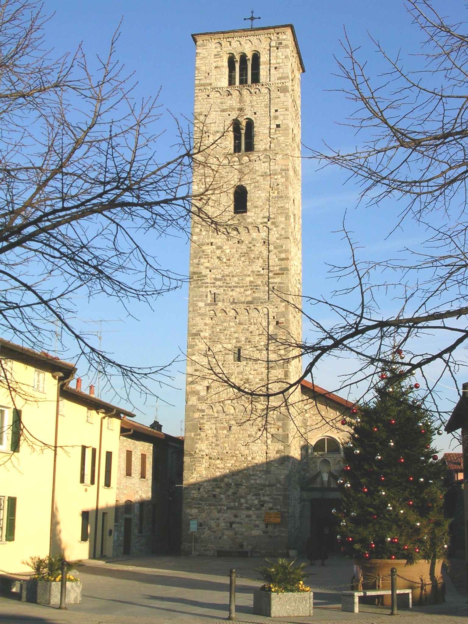 Chiesa romanica di Sant'Eufemia a Erba (CO) con il campanile risalente alla fine dell'XI secolo. Fotografia libera dai diritti di copyright, ceduta a Wikipedia dall'autore, Stefano Ripamonti.